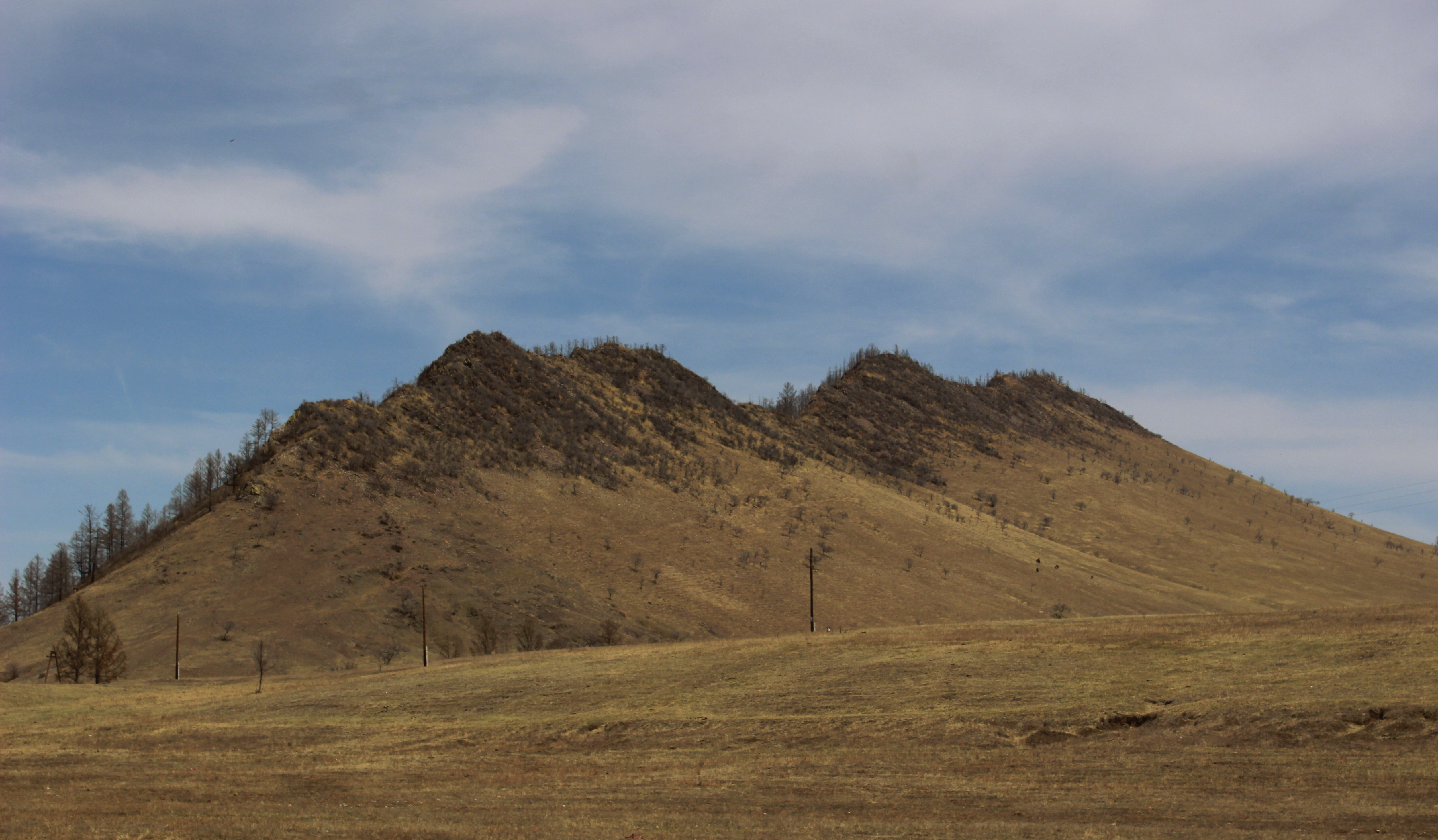 Гора, называемая в народе "верблюдом", на подъездах к селу Армак. Восточная Сибирь, Бурятия, Джидинский район